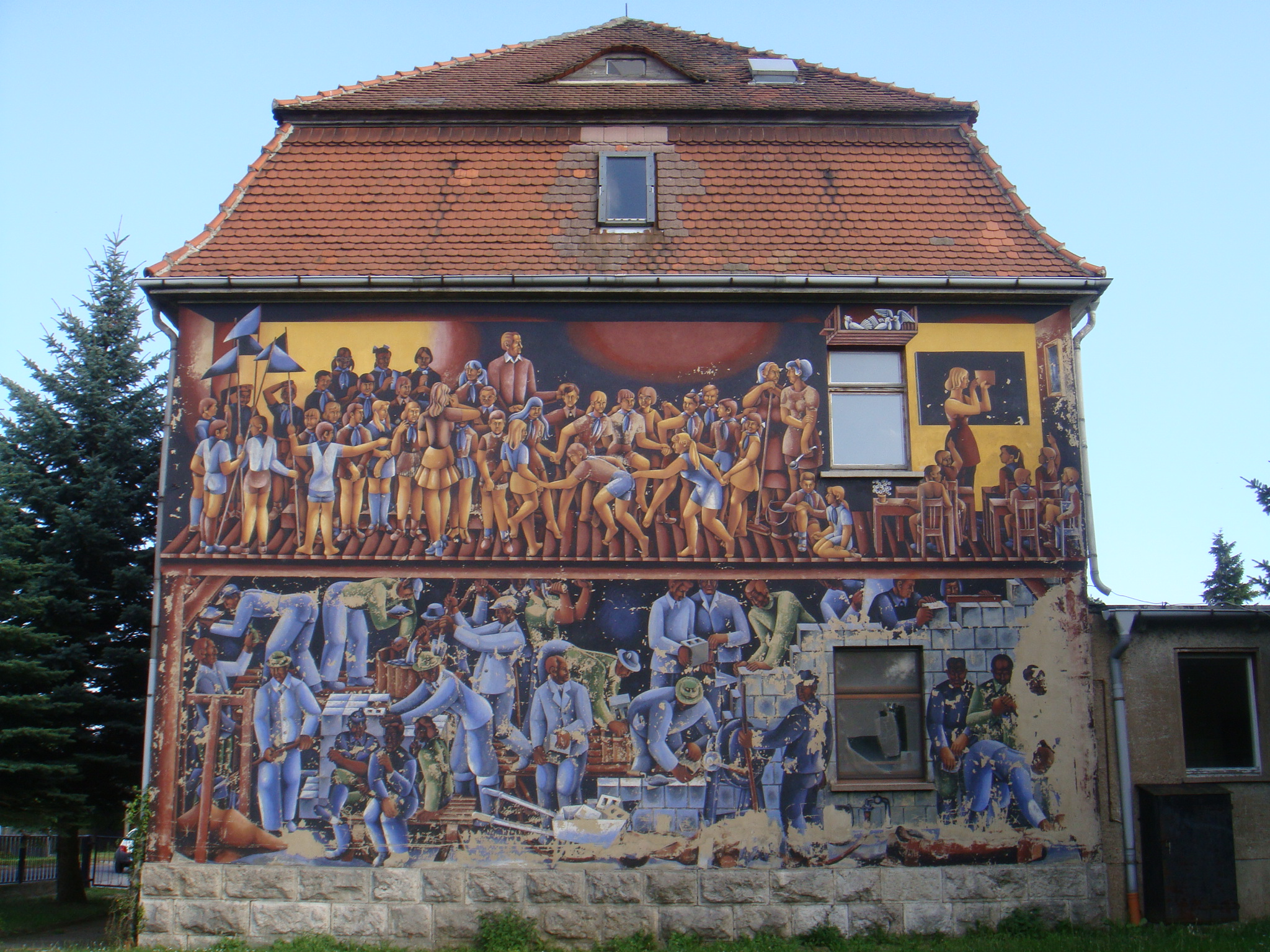 Wandbild an der Schule von Oberroßla